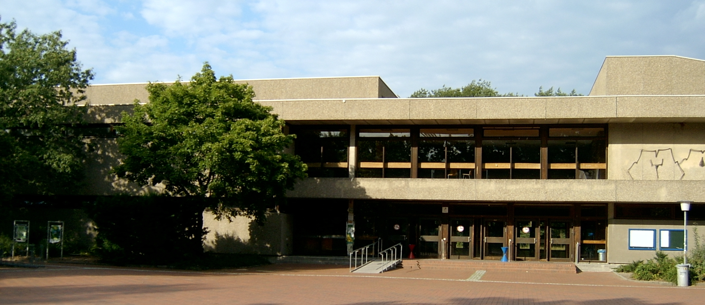 Audimax Gebäude der Justus-Liebig-Universität Gießen.